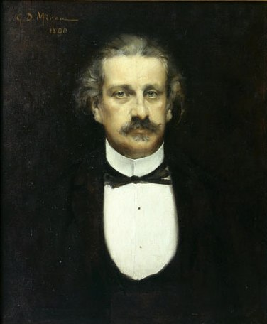 George Demetrescu Mirea -Portretul lui Alexandru Odobescu, ulei pe pânză, Muzeul Naţional de Artă din Bucureşti